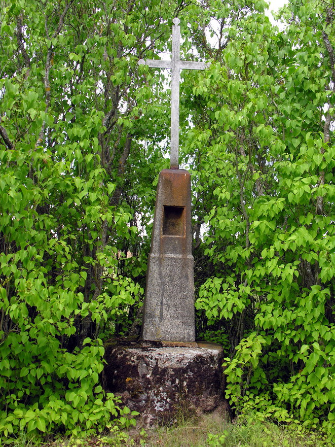 Kryžius (past. 1909 m.) Voverių kaime, Mažeikių raj., Tirkšlių seniūnijoje Foto: Algirdas, 2006 m. rugpjūčio 2 d., Lietuva